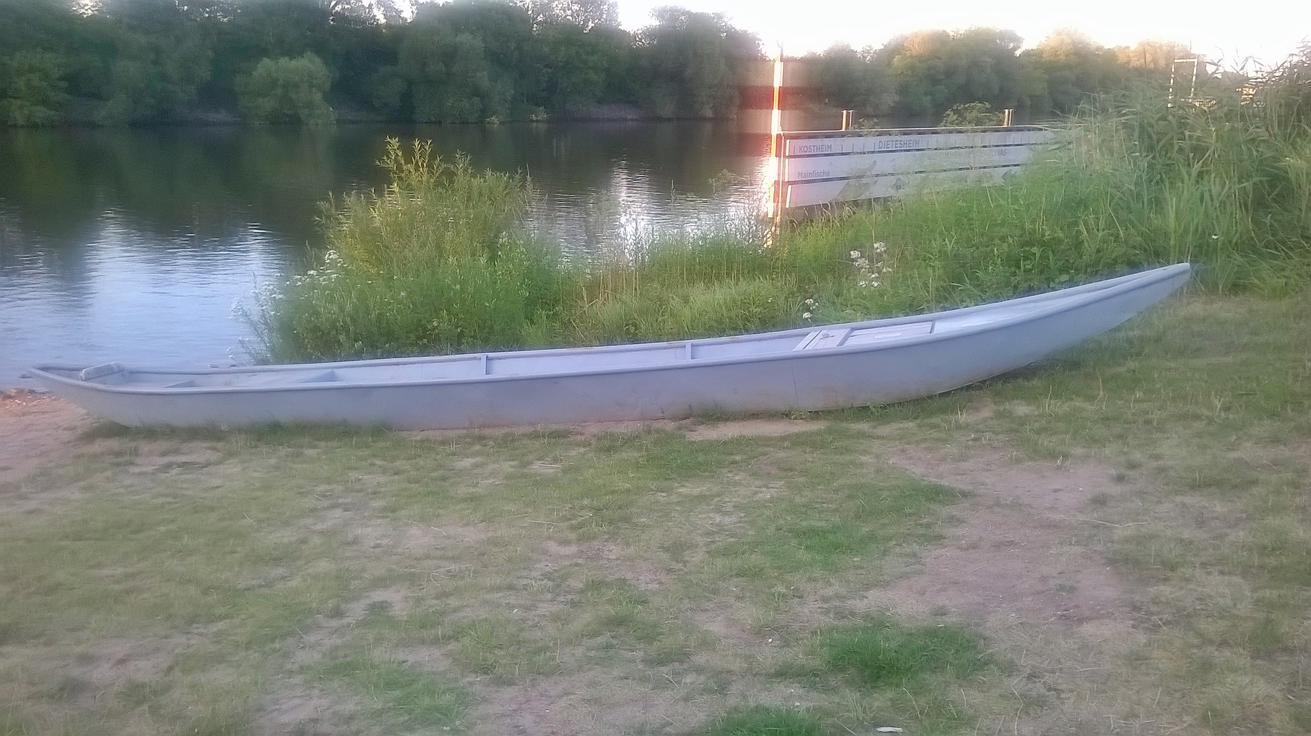 Fischer-Nachen am Main in Dietesheim